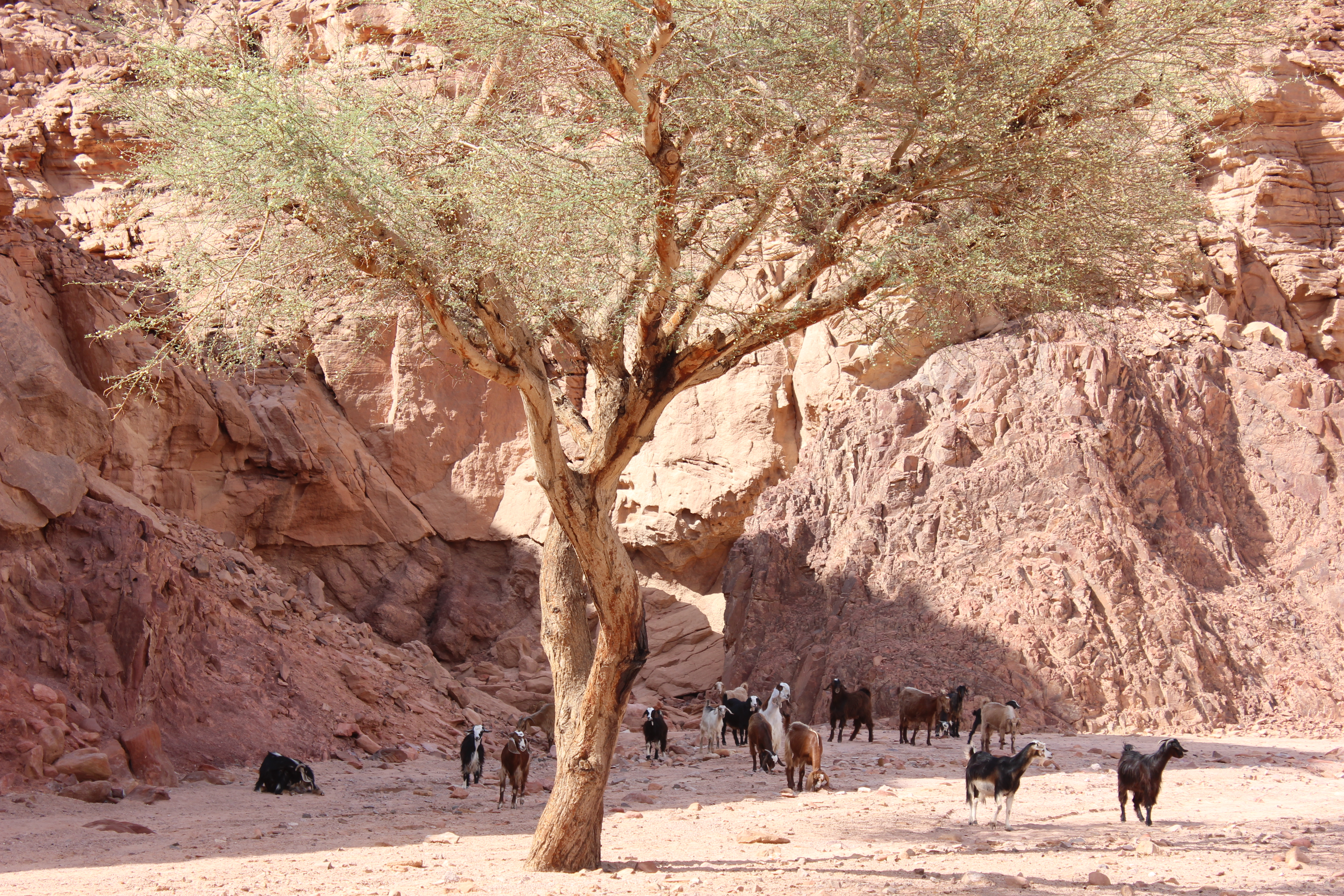 جمل بديسكو تاور، نويبع، مصر.